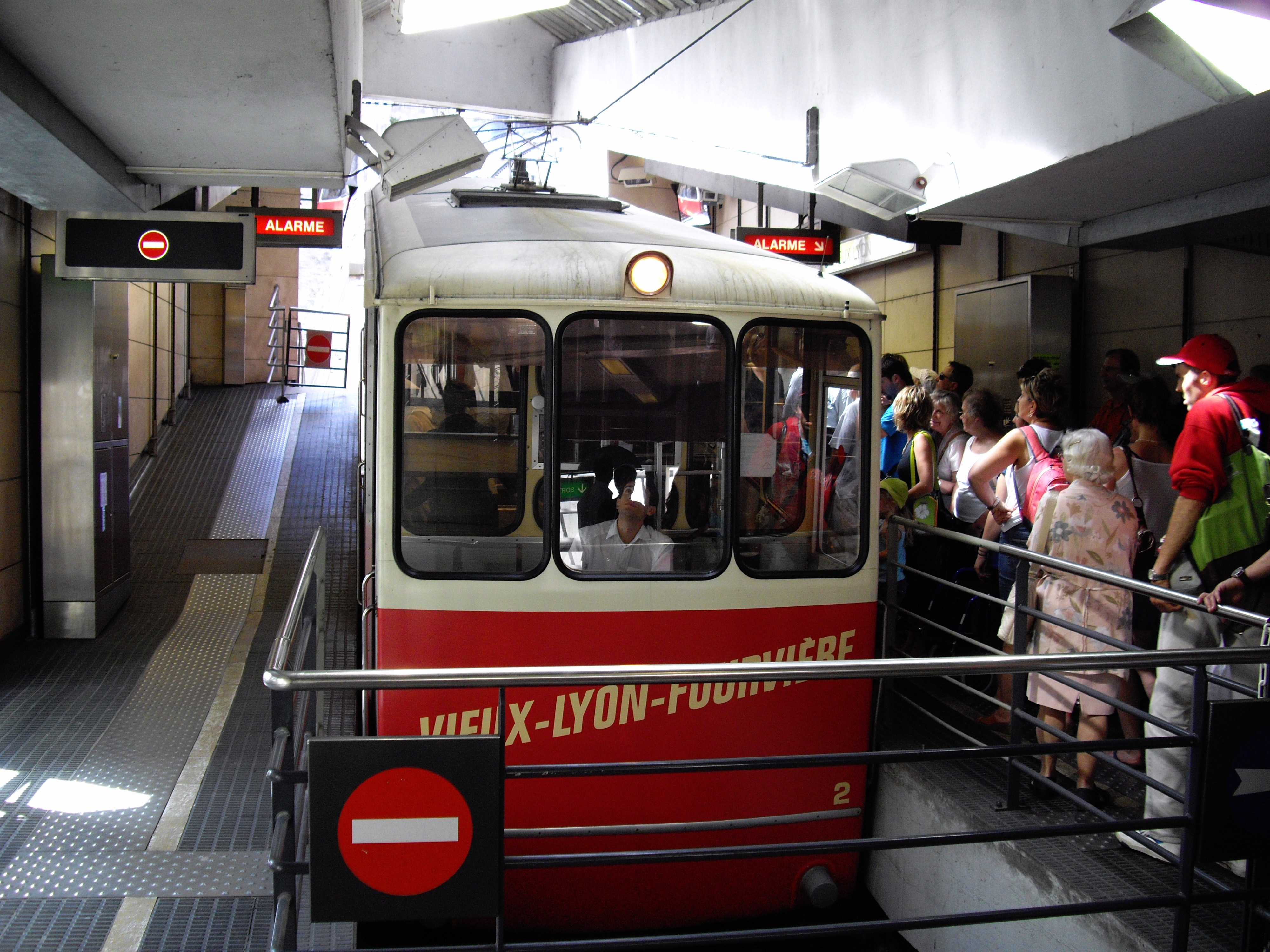 Le Funiculaire Fourvière, à Vieux Lyon.